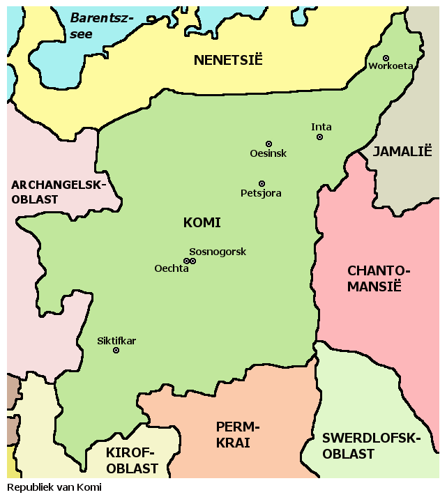 Afrikaanse kaart van Komi, Rusland